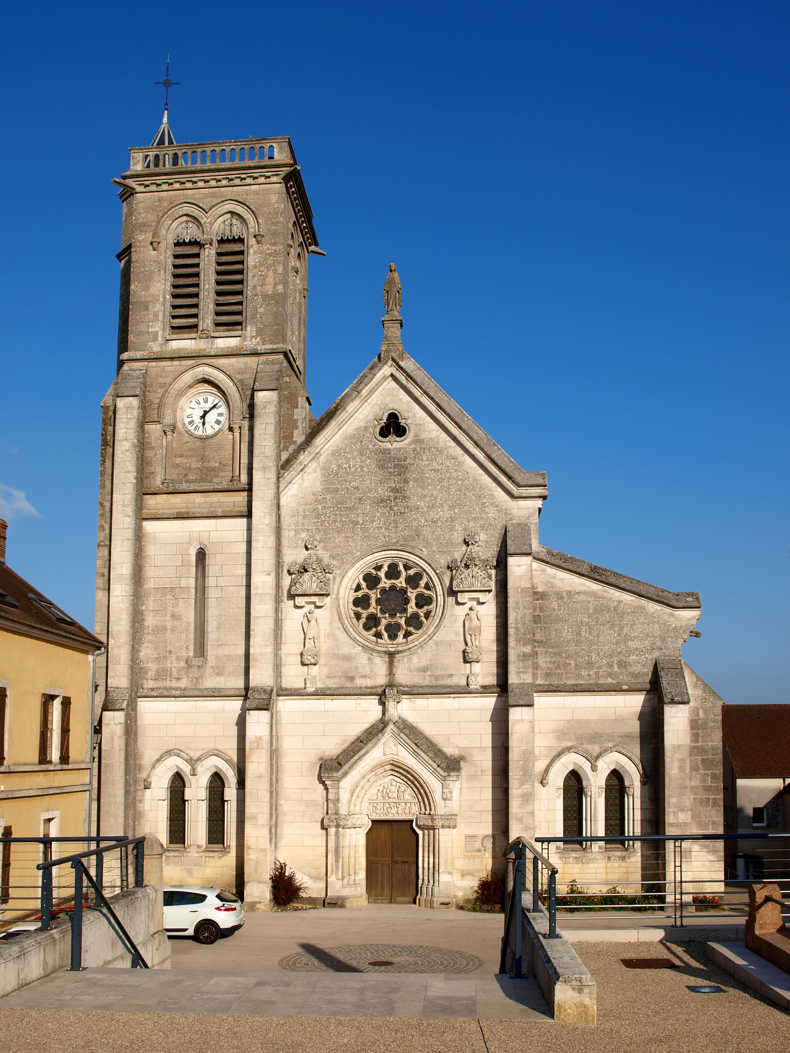 Église de Pourrain (Yonne, France), dédiée à Serge et Bacchus de Rasafa.